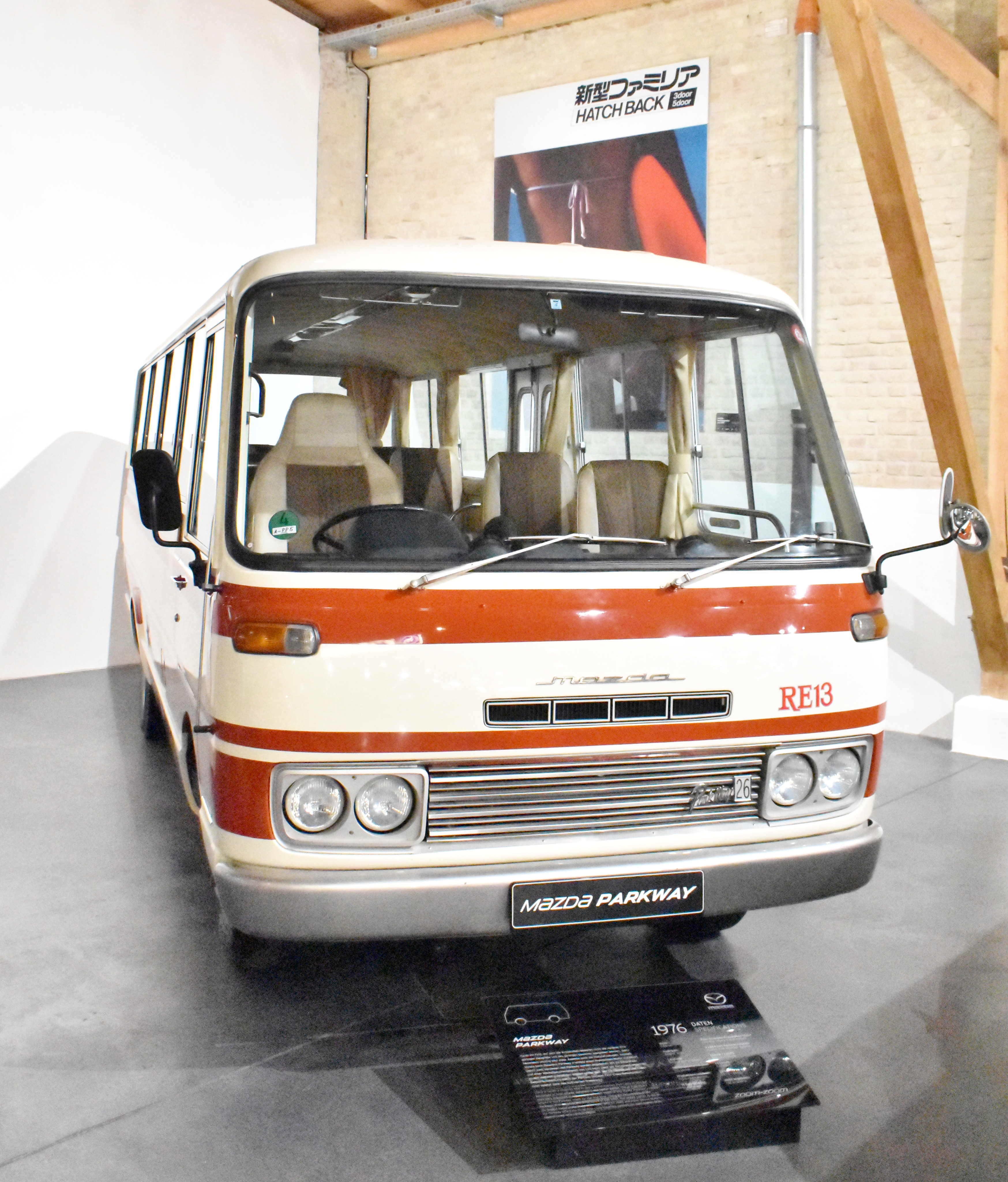 Mazda Parkway, Baujahr 1976, im Mazda-Museum Augsburg